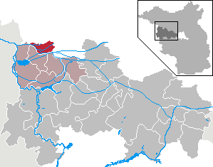 Großderschau in Brandenburg (Country) - District Havelland